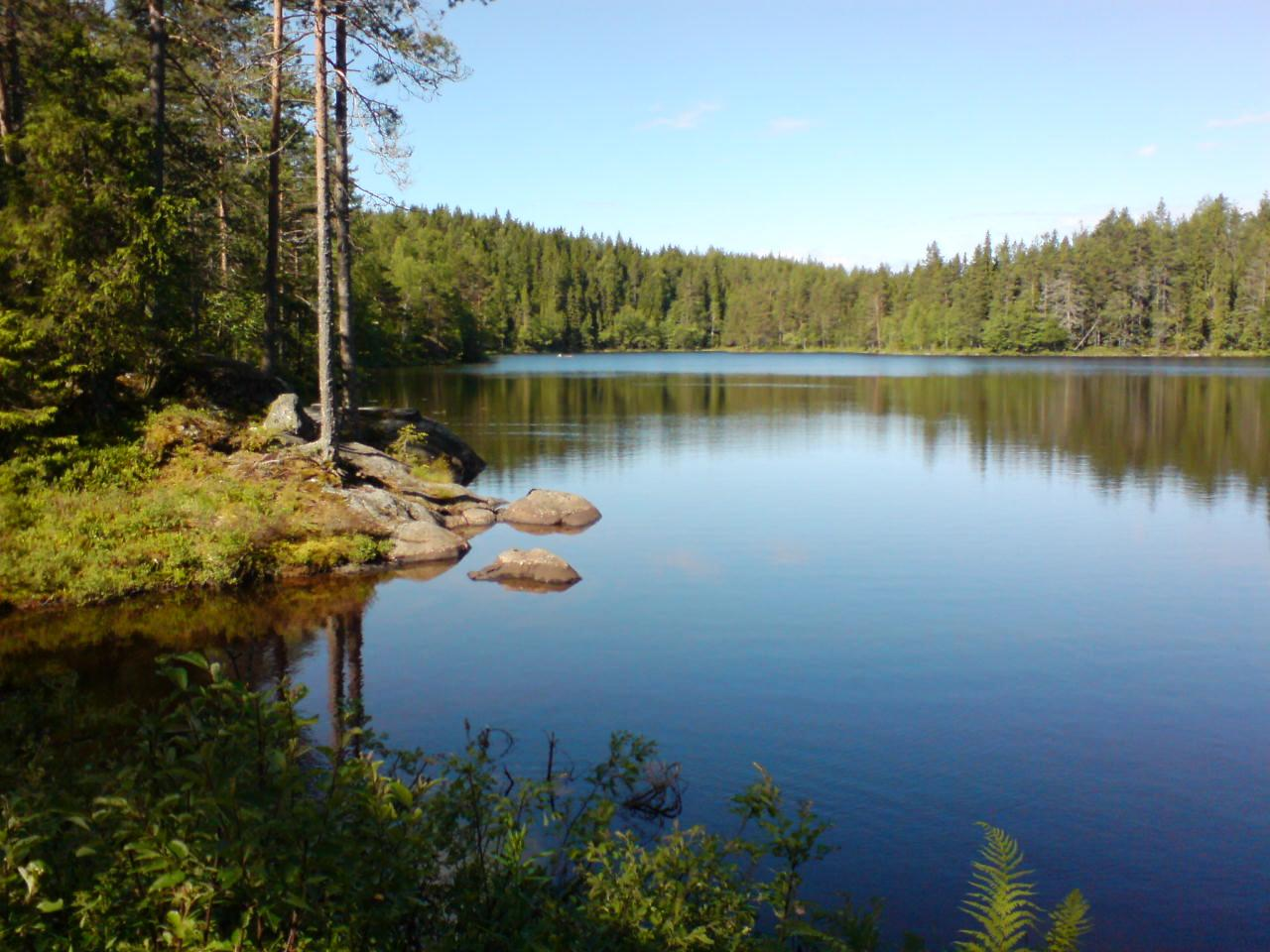 Stavtjenn på Lierfoss i Aurskog-Høland, sett fra skogsbilvegen øst for tjernet.